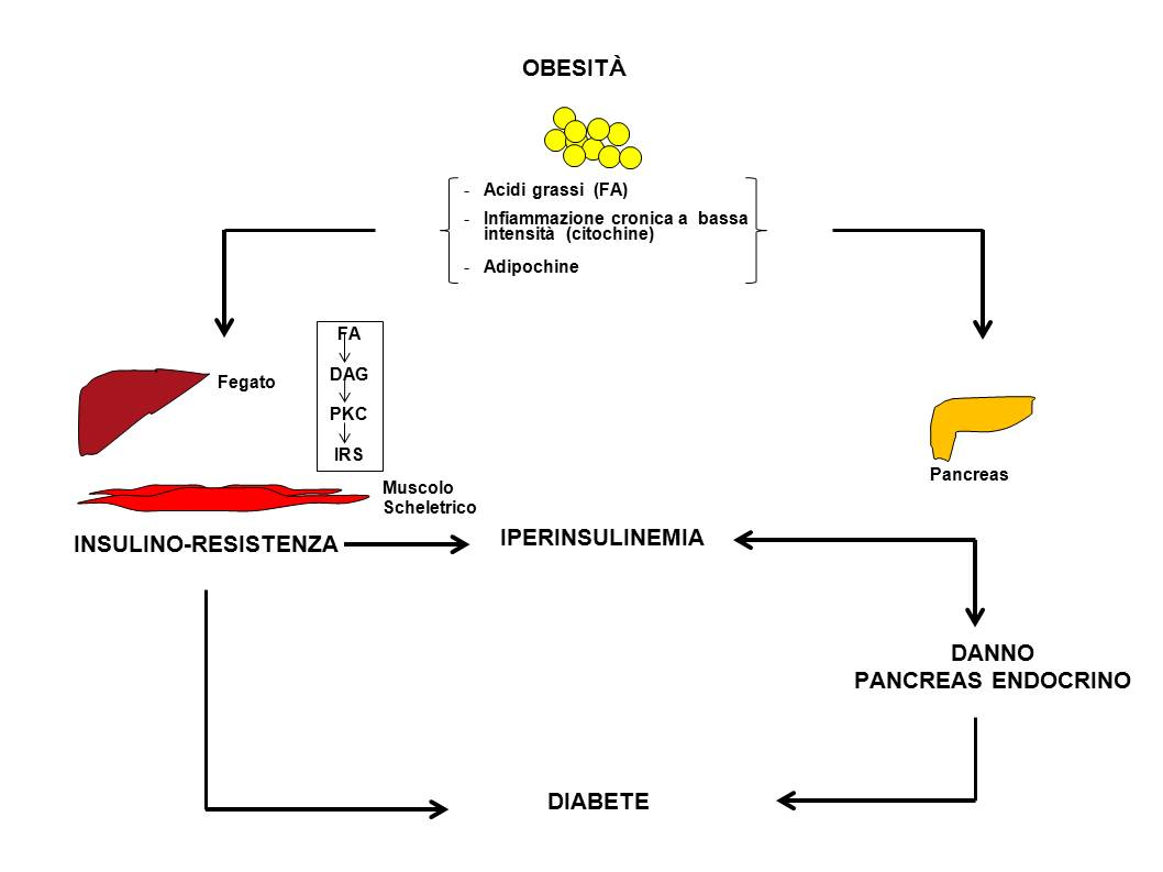 Schema della fisiopatologia dell'insulino-resistenza e del diabete nella sindrome metabolica.